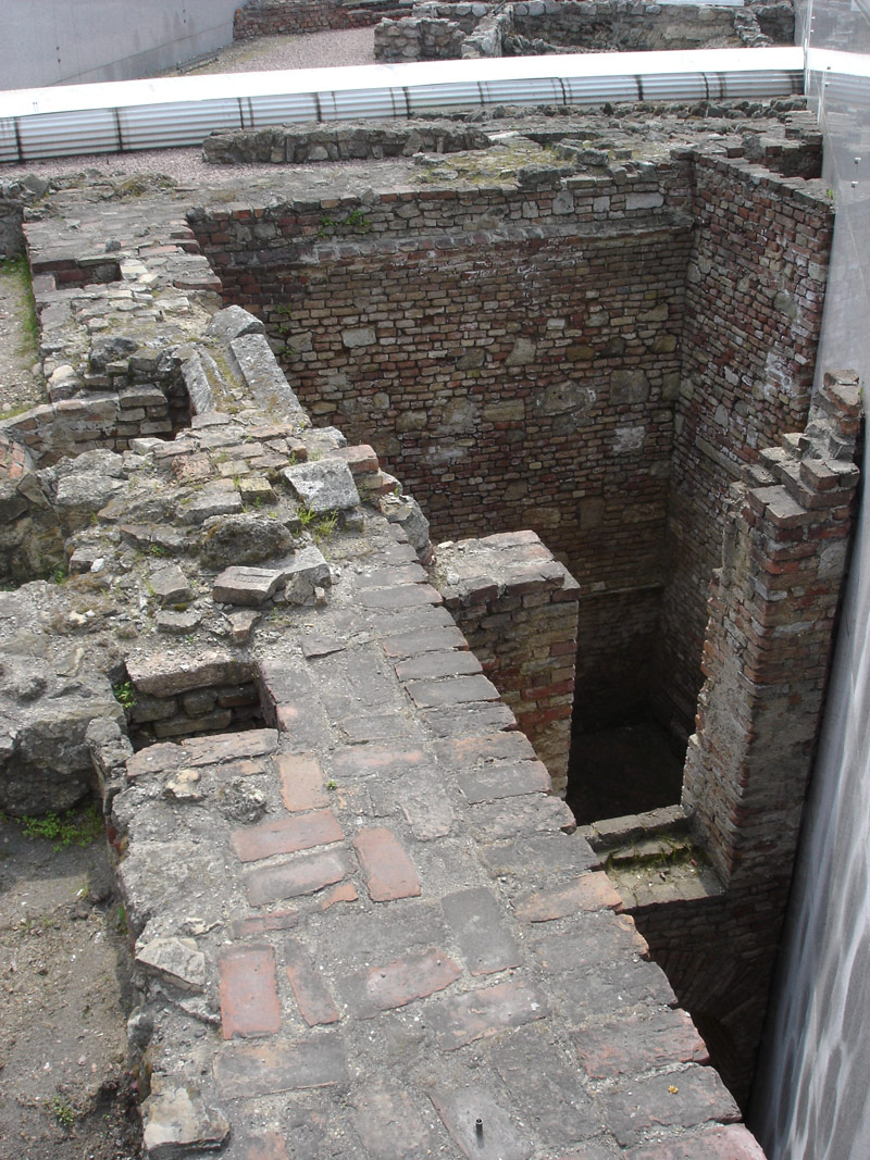 Römische Ausgrabungen an der Hofburg, Wien